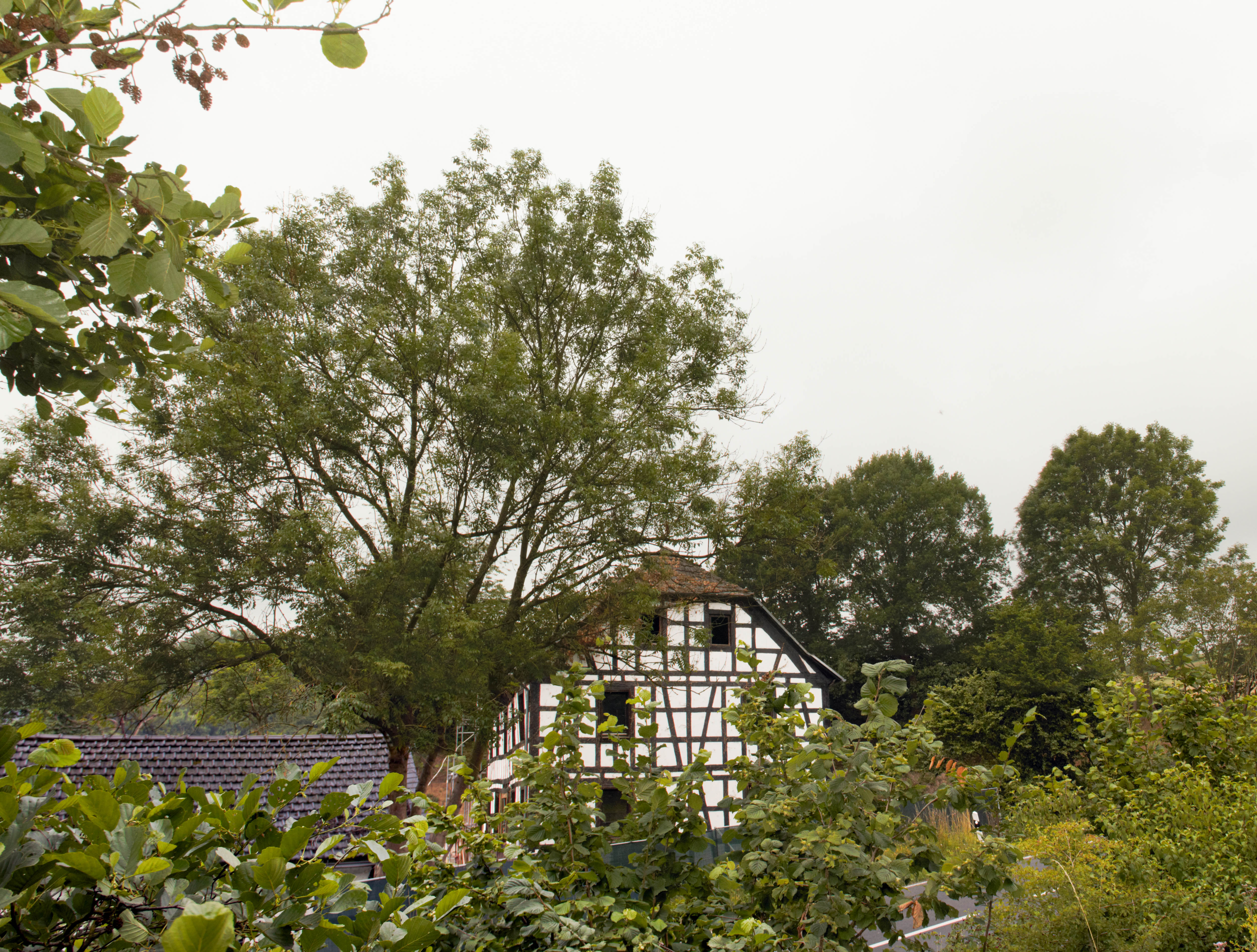 Fachwerkhaus Gut Rosauel am 15. Juli 2015